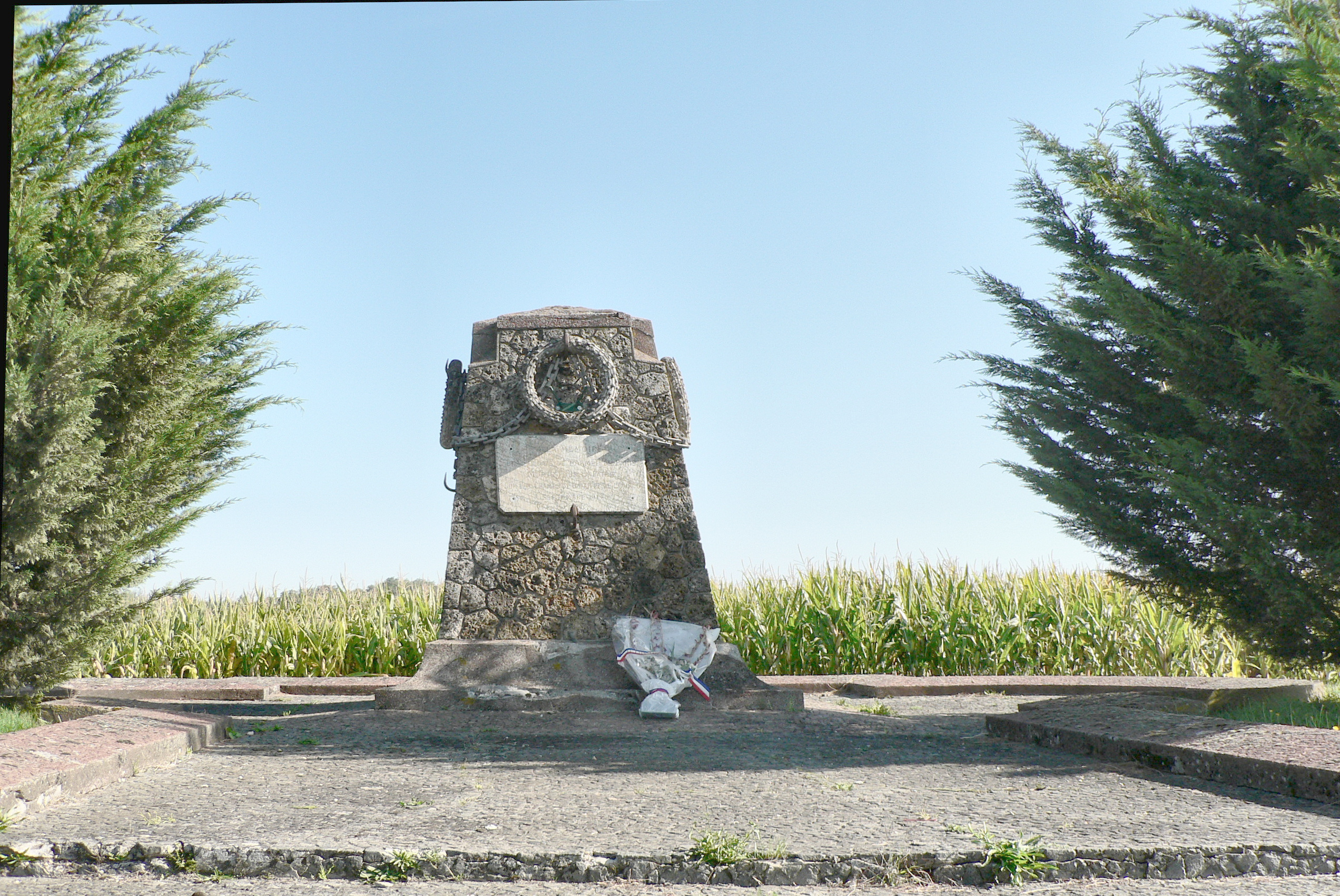 Monument des 4 routes élevé par Gallieni en 1915, à la mémoire de l'armée de Paris